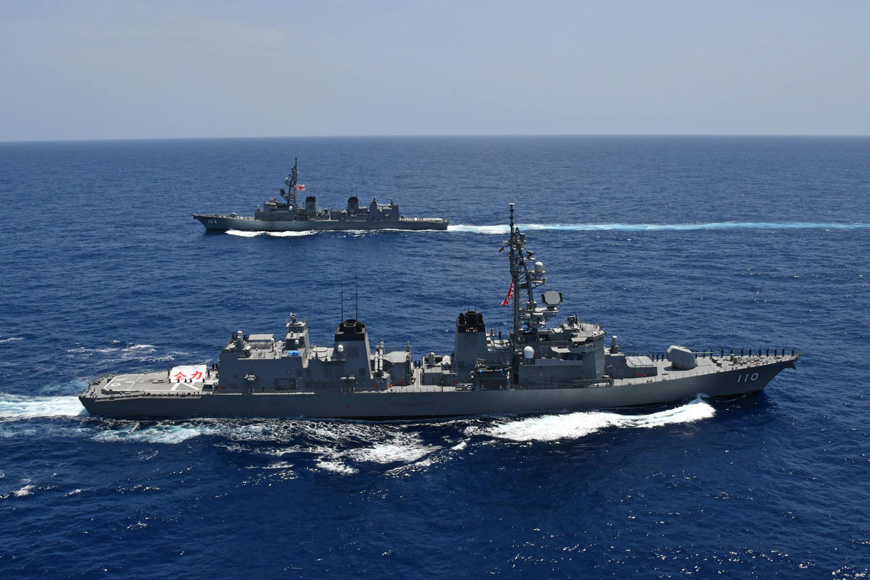 中東情報収集第1次隊「たかなみ」から第2次隊「きりさめ」に任務を引き継ぐ